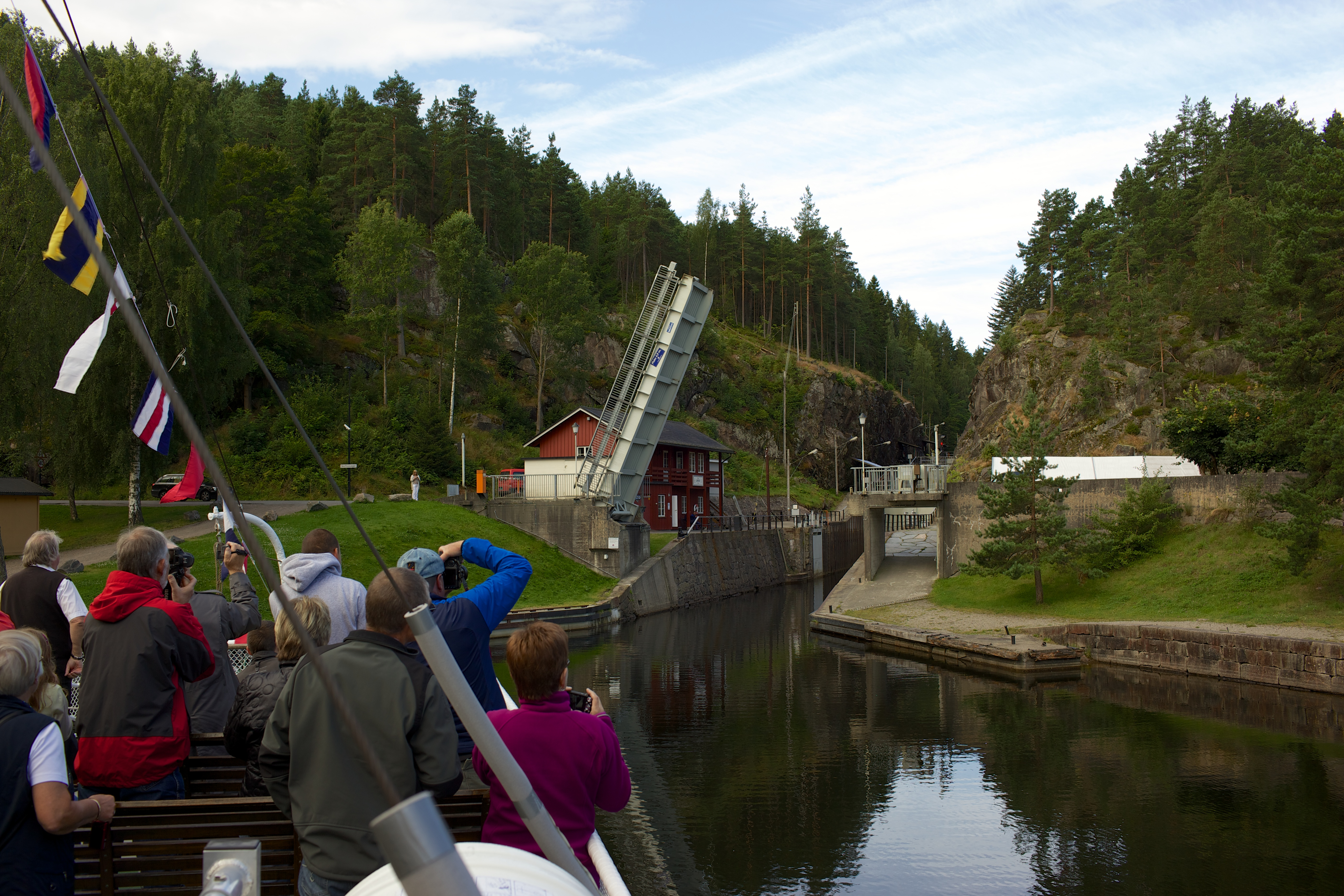 Utsikt fra Victoria ved Skotfoss.